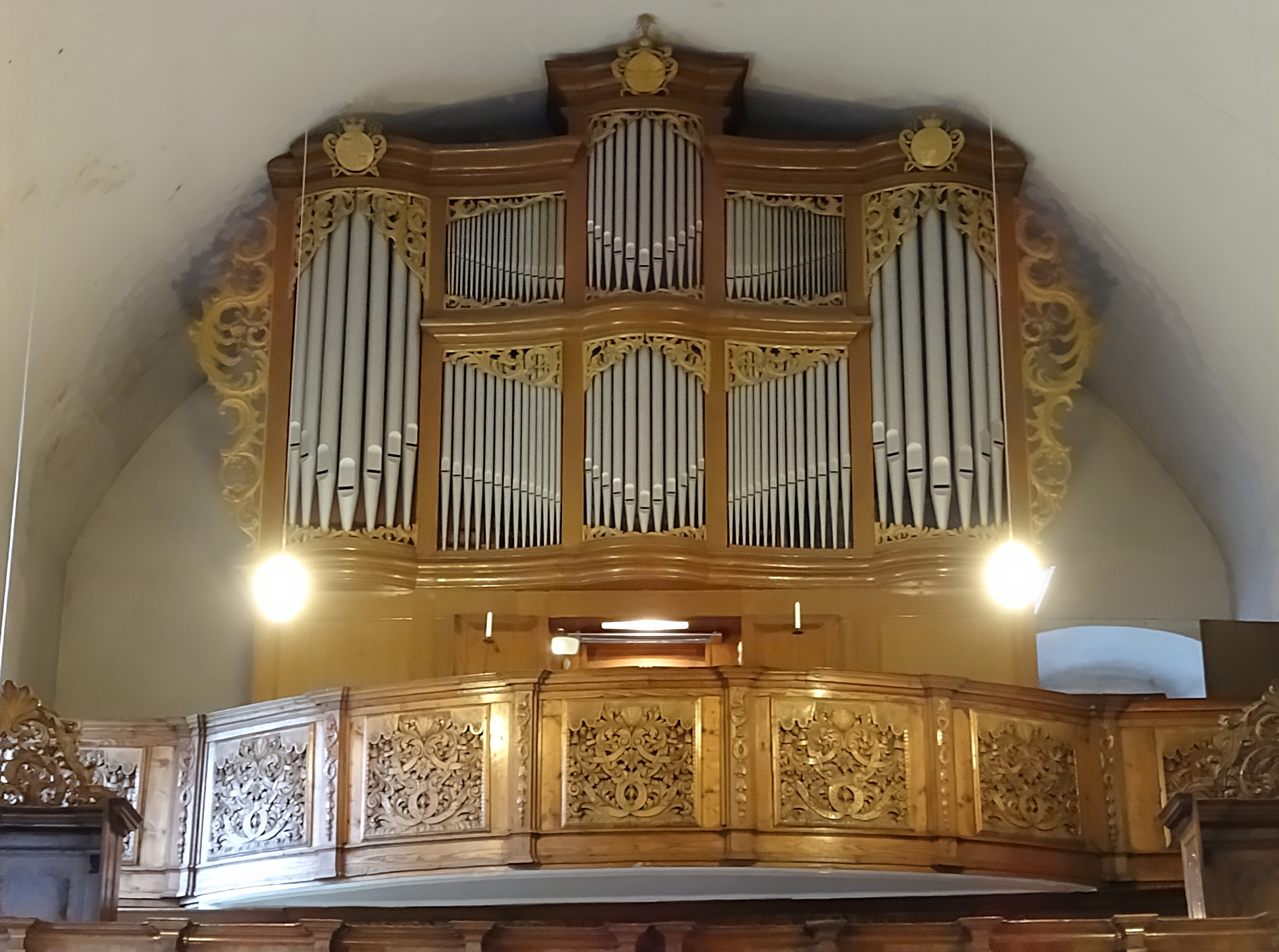 Orgel der Klosterkirche Meyendorf von Christoph Treutmann (1793)[1]